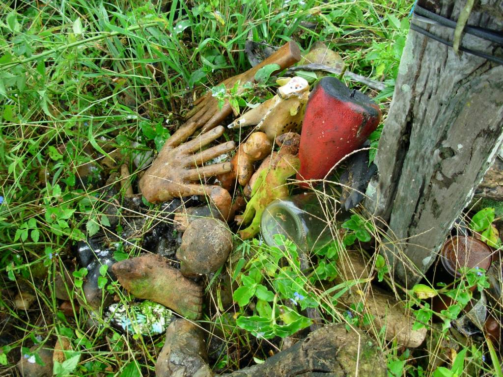 Ex-votos que foram depositados no pé do Cruzeiro de Antas, Bahia.